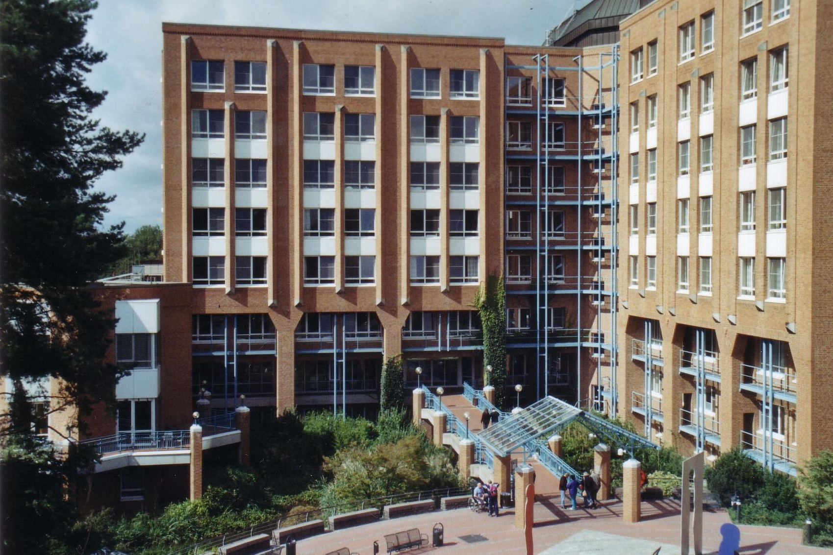 Stammhaus des Berufsgenossenschaftlichen Unfallkrankenhauses Hamburg